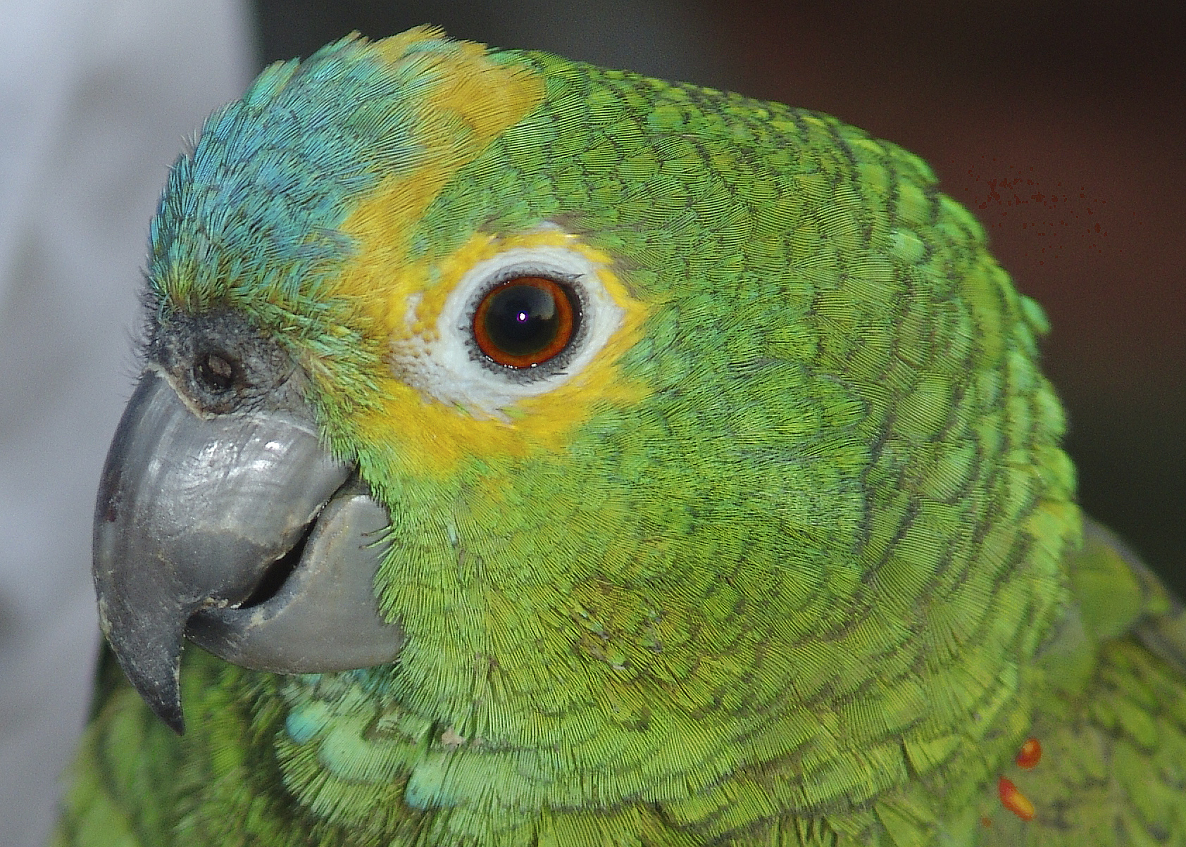 Papagaio (Macho) em Avaré, Brasil